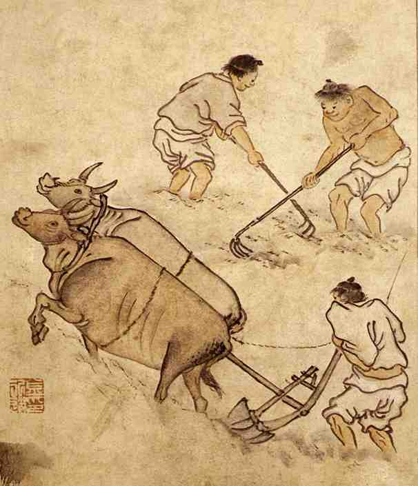 논갈이(耕畓), 단원풍속도첩(檀園風俗畵帖)에서 종이에담채, 27cm x 22.7cm, 국립 중앙박물관 소장